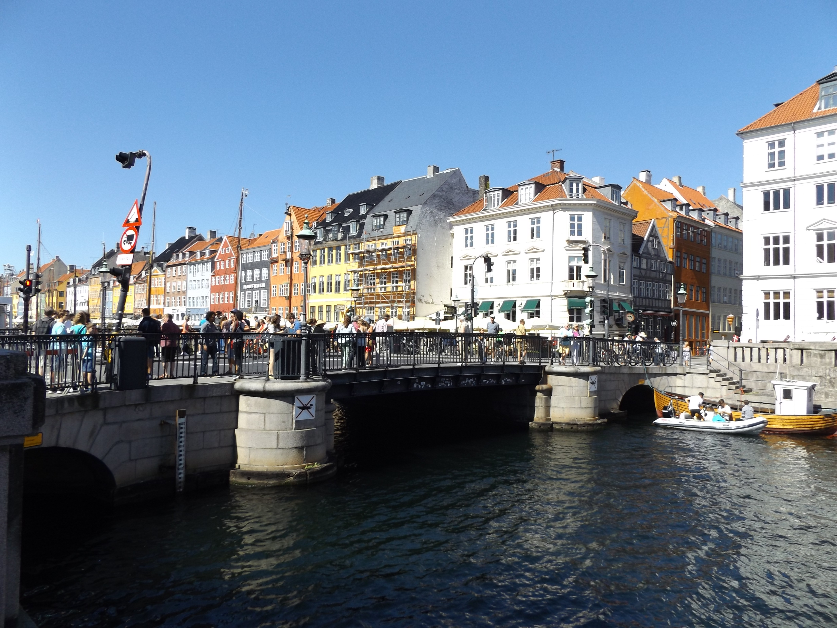 The Nyhavn Bridge in Copenhagen, Denmark